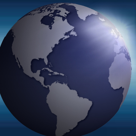 planet illustration in blue